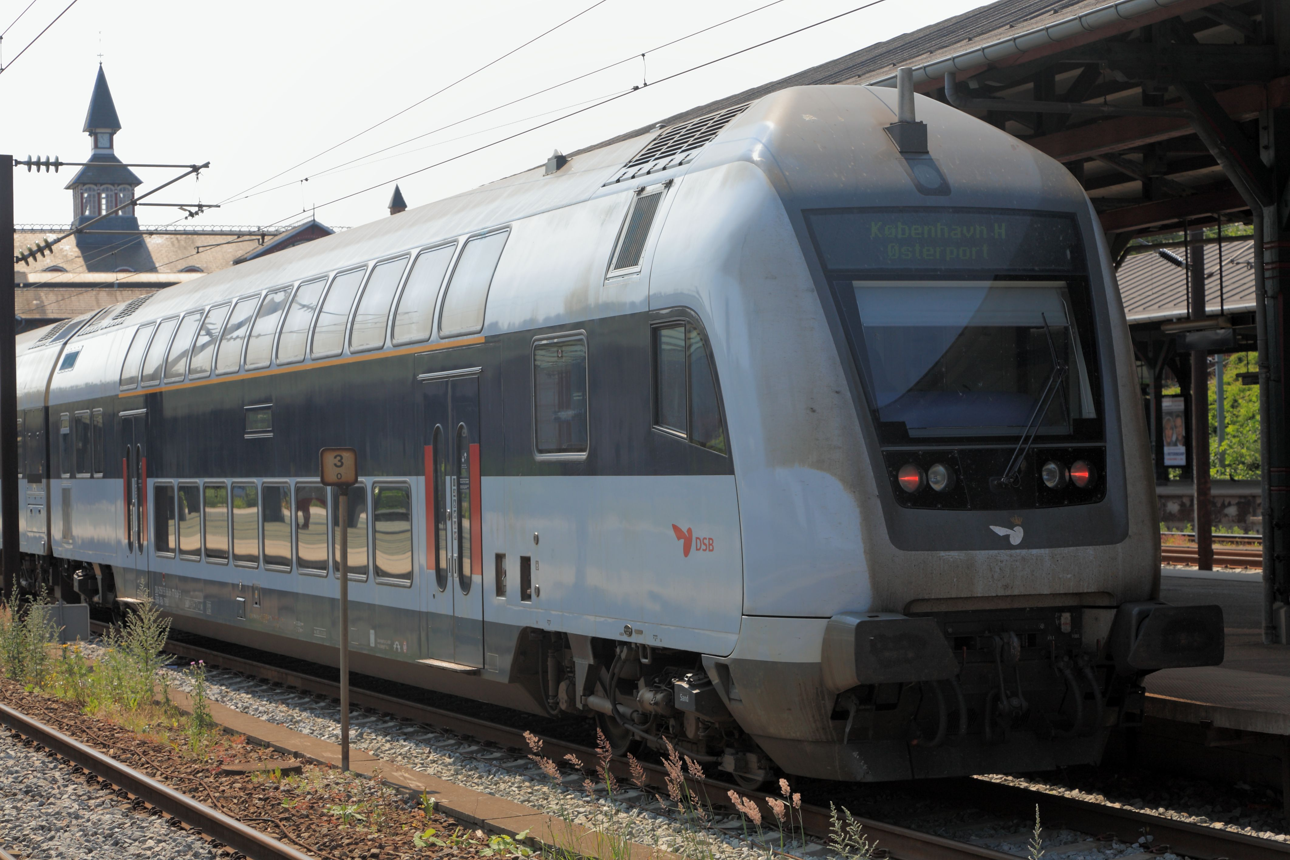 Bauart Görlitz, Wendehalt (von und nach Røskilde)